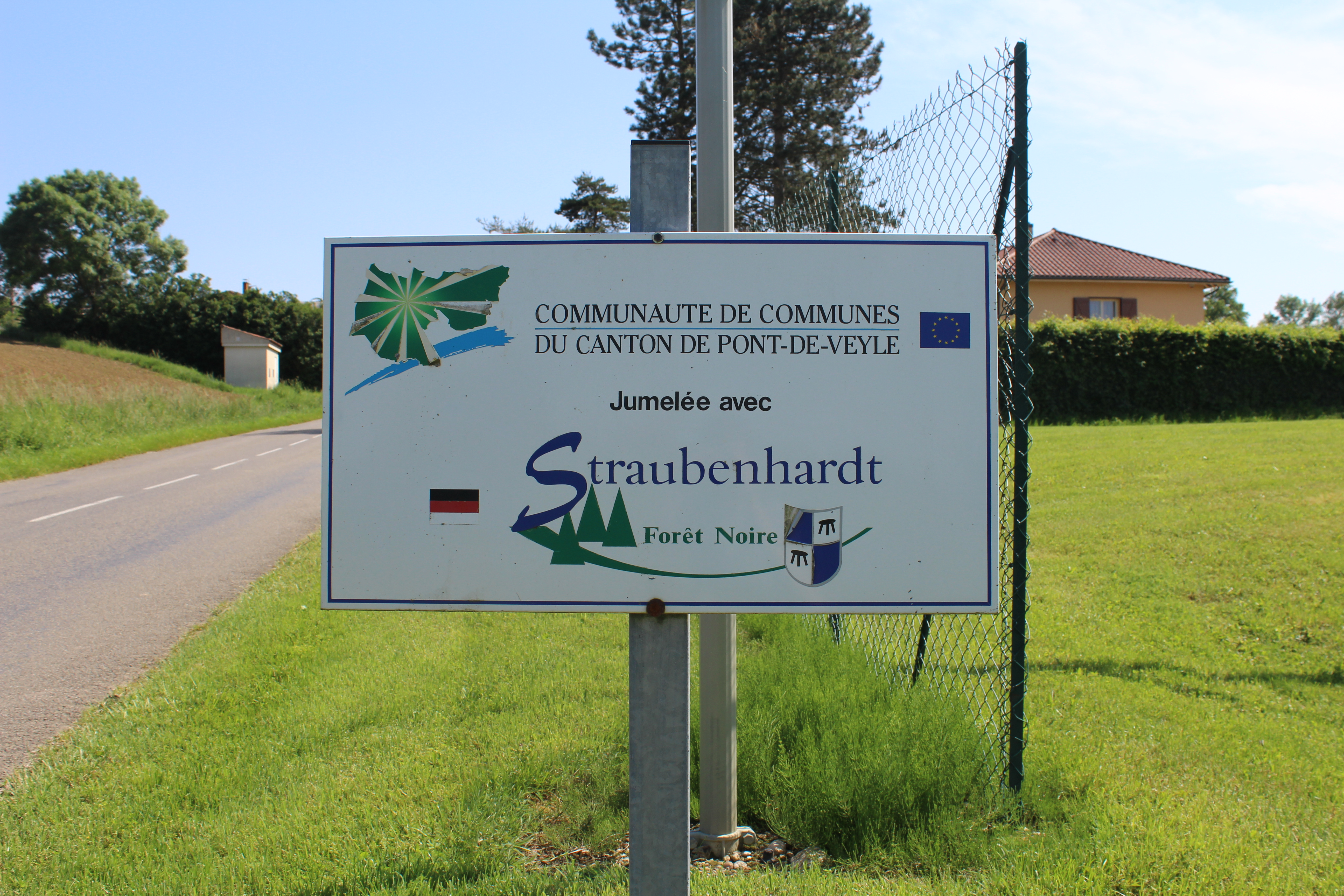 Panneau indiquant le jumelage entre Straubenhardt et la communauté de communes du canton de Pont-de-Veyle à Saint-Genis-sur-Menthon.